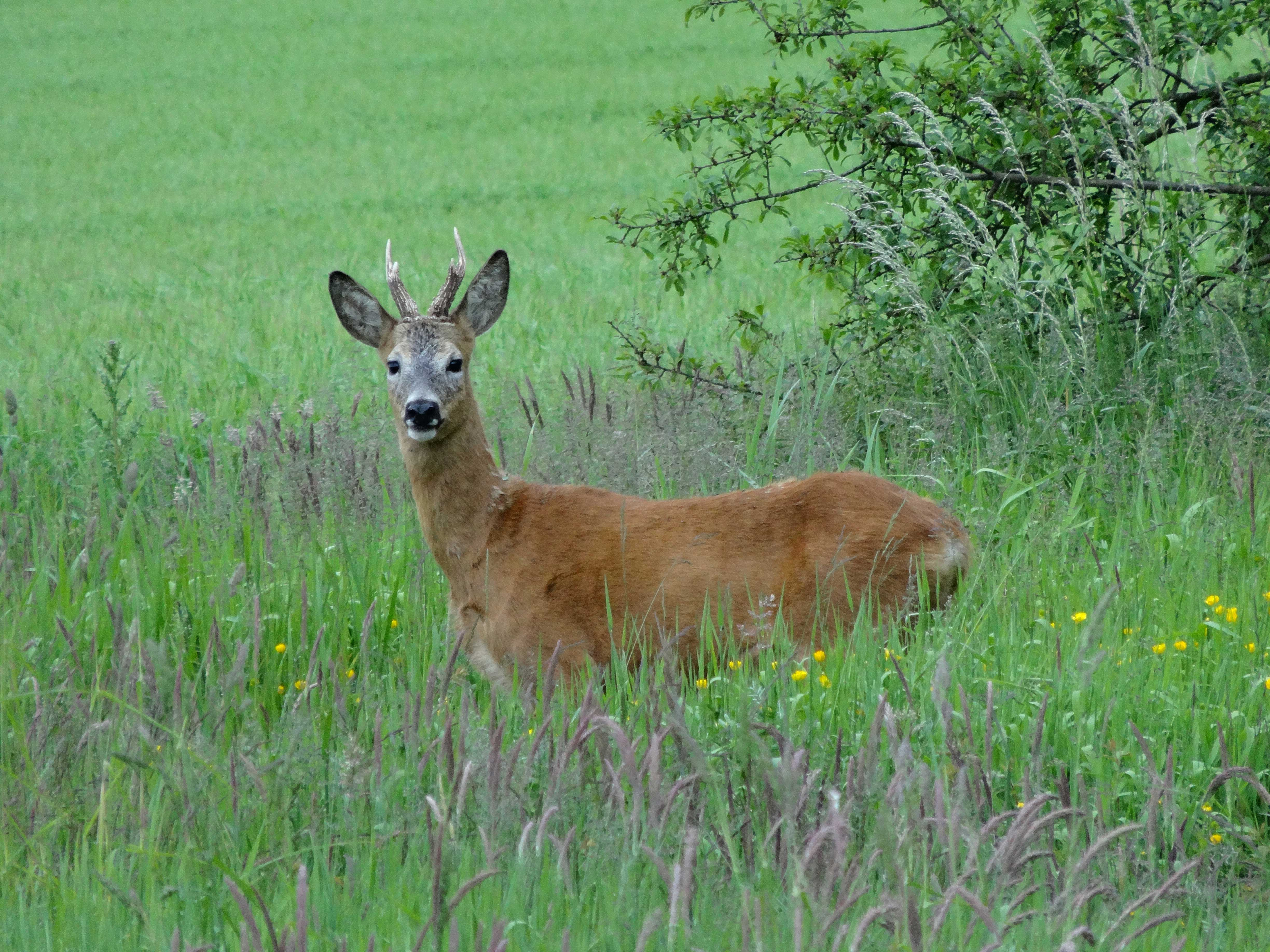 Reebok in Gasselte